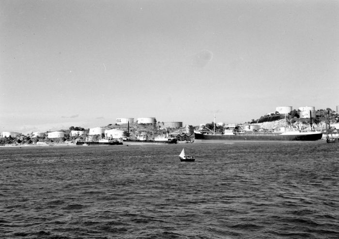 Repronegatief. Havengezicht met olietanks van de Shell op Poelau Samboe